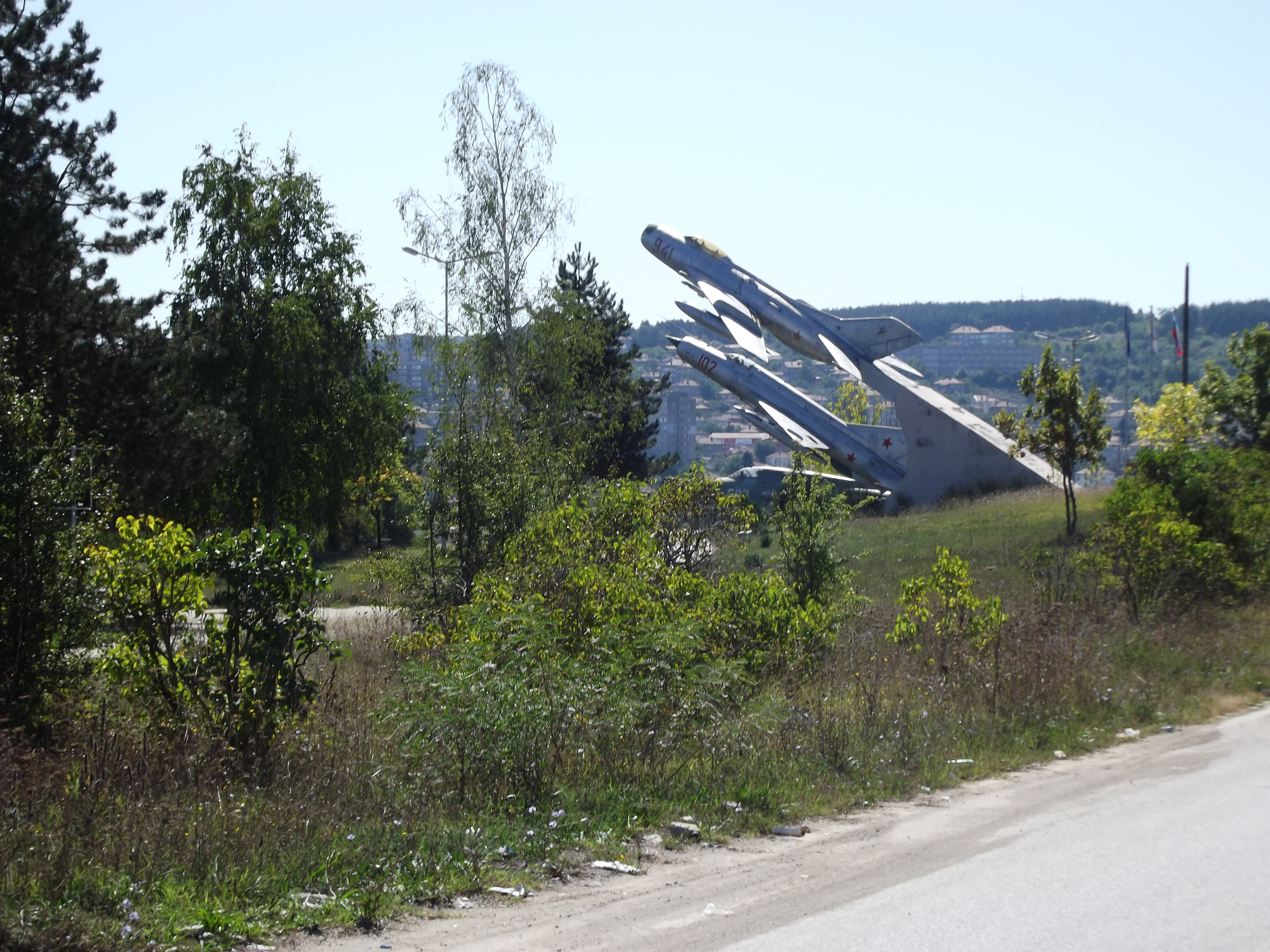 МиГ-15 и МиГ-19, Авиационно-Космически парк, град Омуртаг.